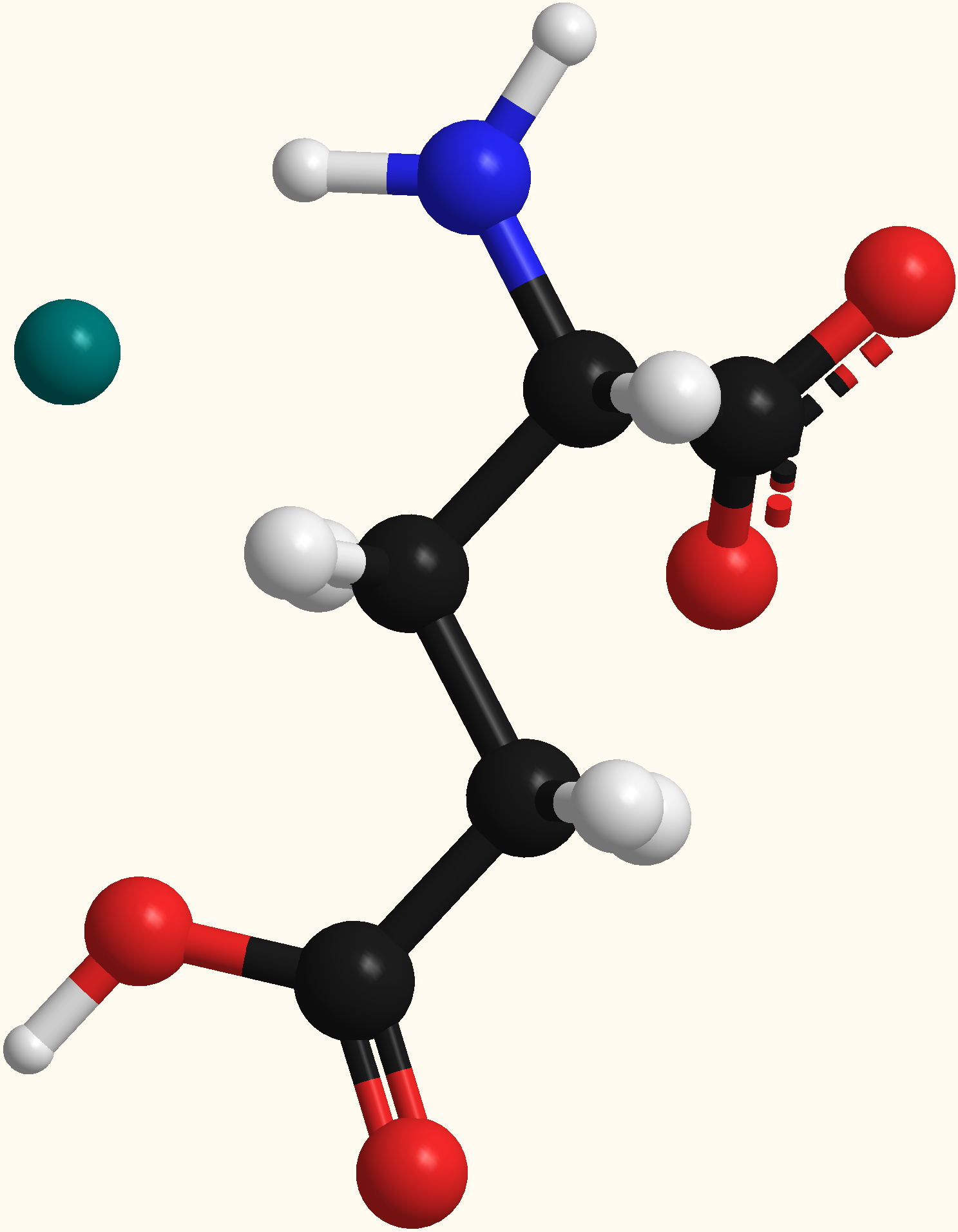 Изображение глутамата натрия, натрий выделен салатовым цветом